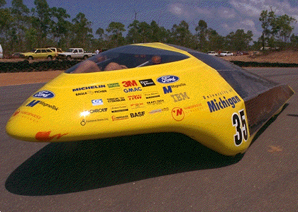 Maize & Blue in Australia.